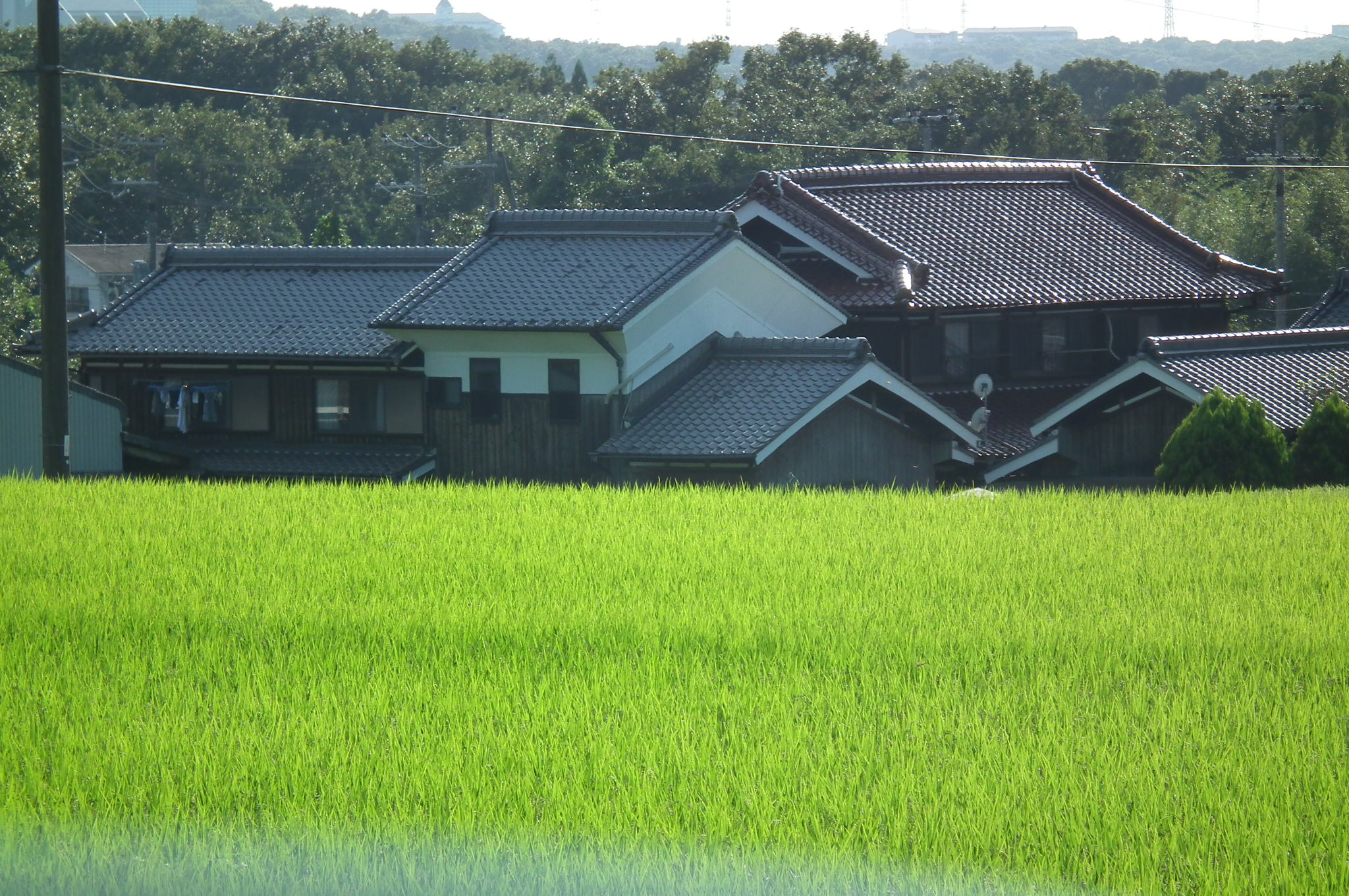 兵庫県三木市平井UnknownUnknown rice field hirai,miki,hyogo